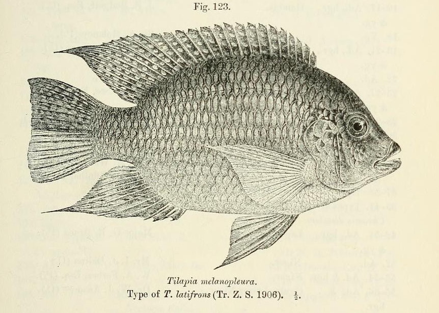 Coptodon zillii